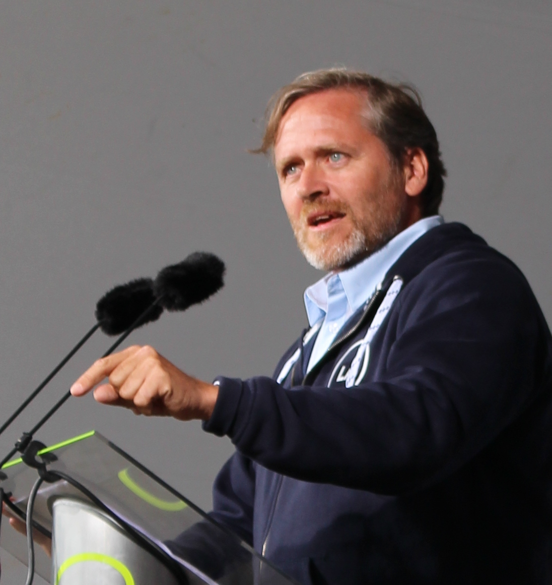 Partileder for Liberal Alliance taler under Folkemødet 2016 fra hovedscenen.